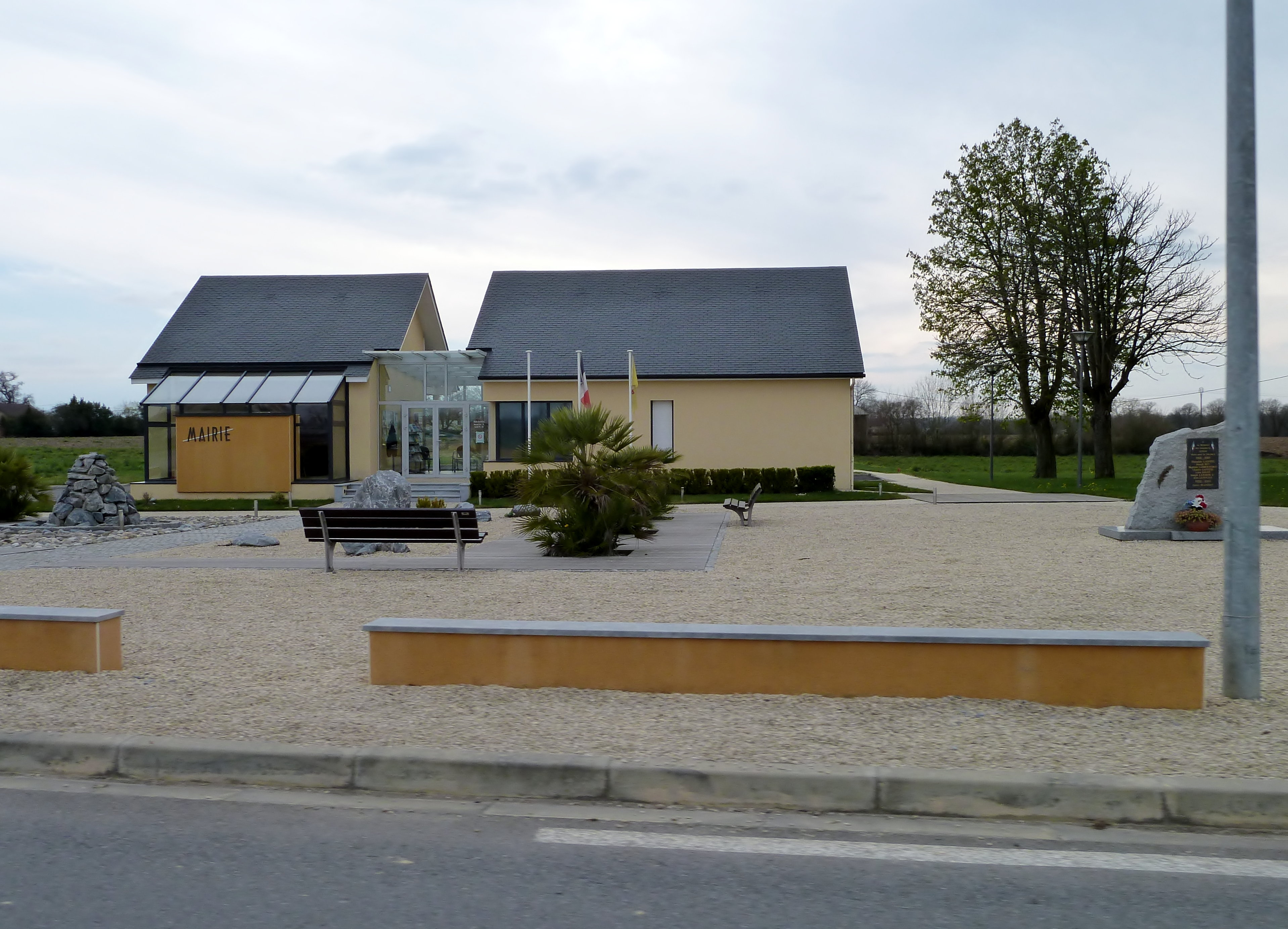 Mairie et monument aux morts d'Auriac (Pyrénées-Atlantiques)